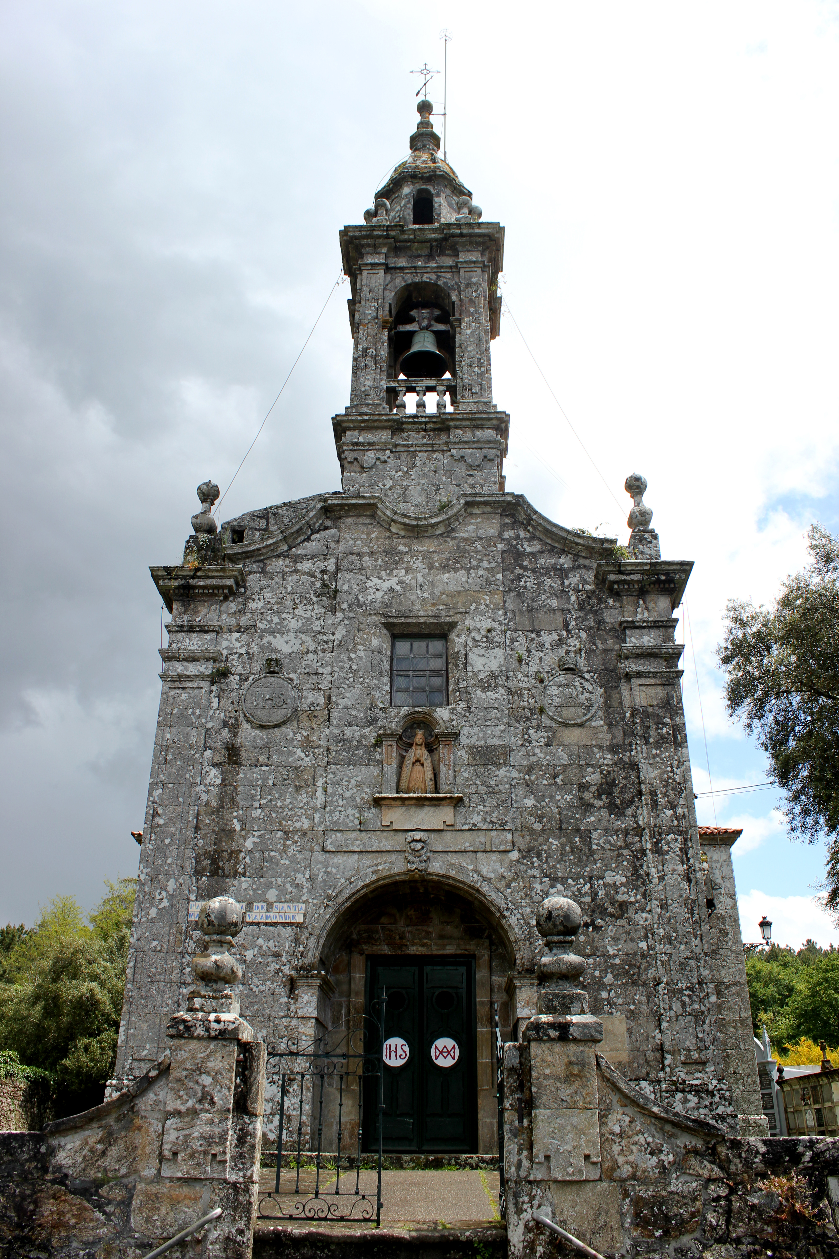 Igrexa de Bamonde, Teo.